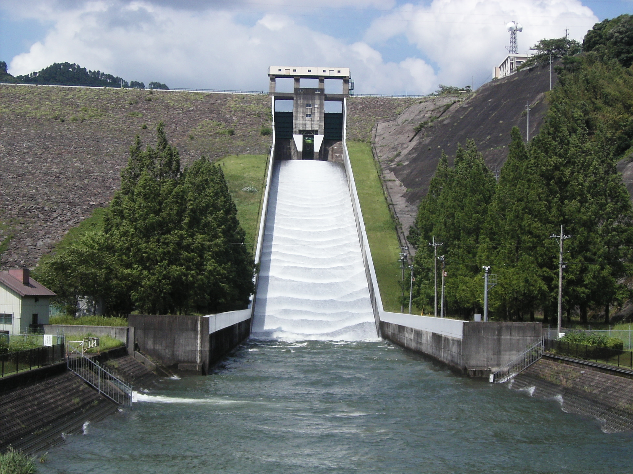 寺内ダム白くまぶしい水しぶき